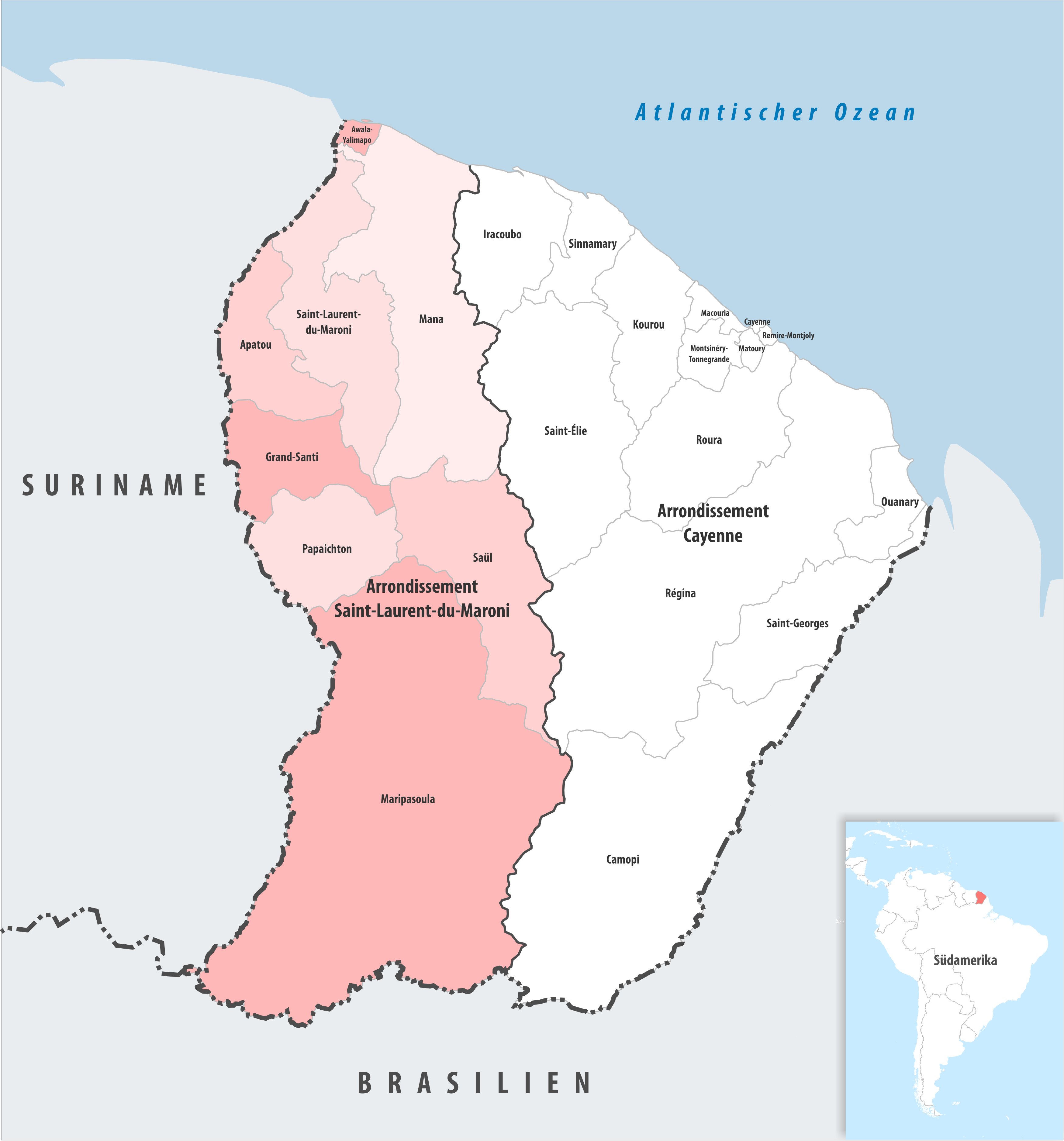 Lage des Arrondissements Saint-Laurent-du-Maroni